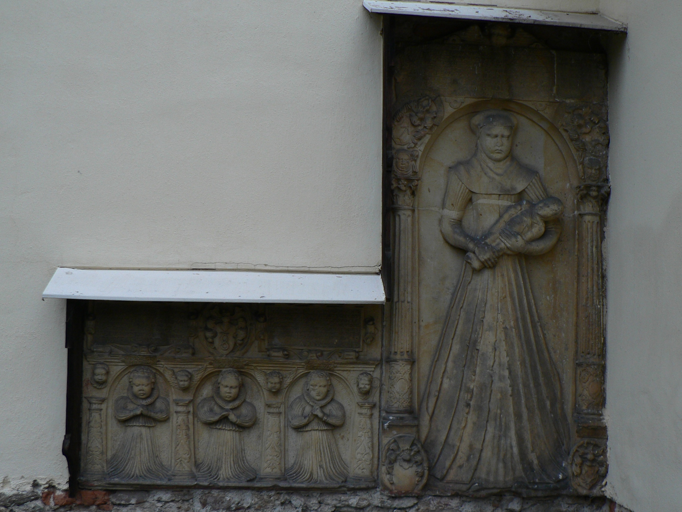 Kostel svatého Linharta (Dolní Studénky), náhrobek Bukůvků z Bukůvky